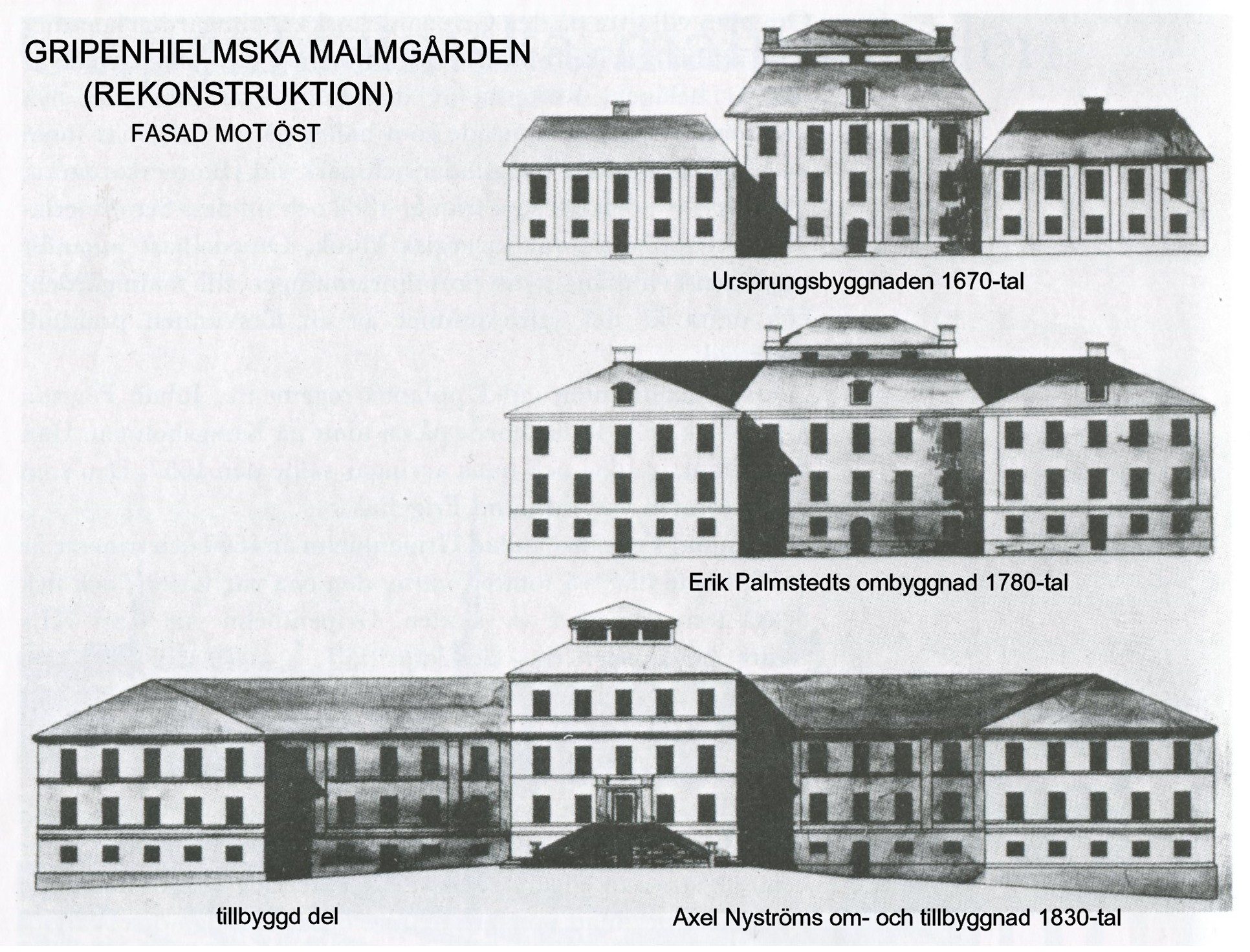 Serafimerlasarettets ursprungliga östfasad med den Gripenhielmska malmgården, om- och tillbyggnadsetapper som bygger på äldre fasadritningar, kompl med uppgifter av Holger Ellgaard